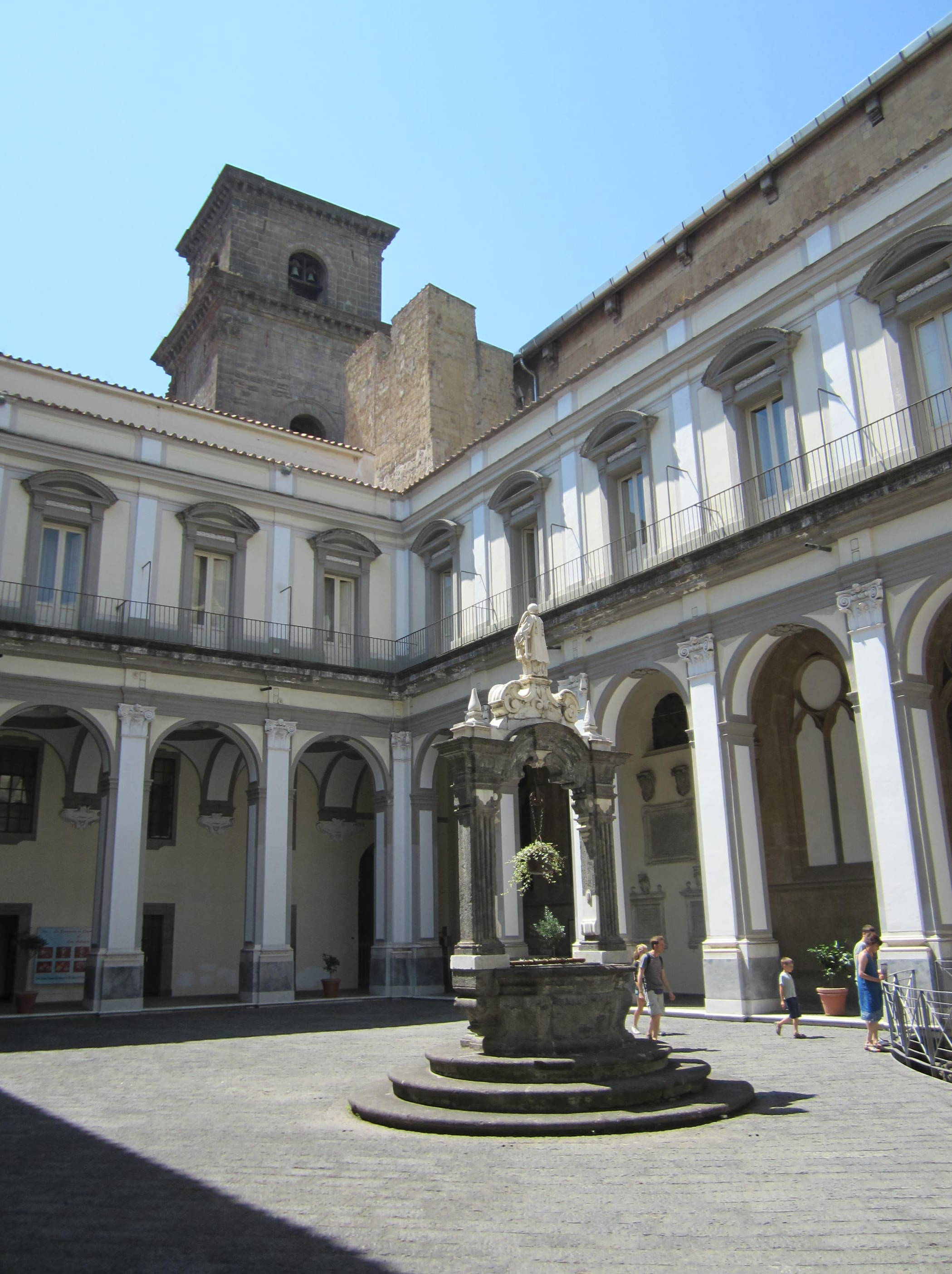 Chiostro della Basilica di San Lorenzo Maggiore a Napoli